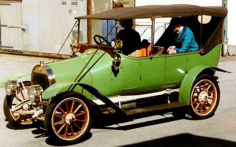 Pilain 4S Touring 1911